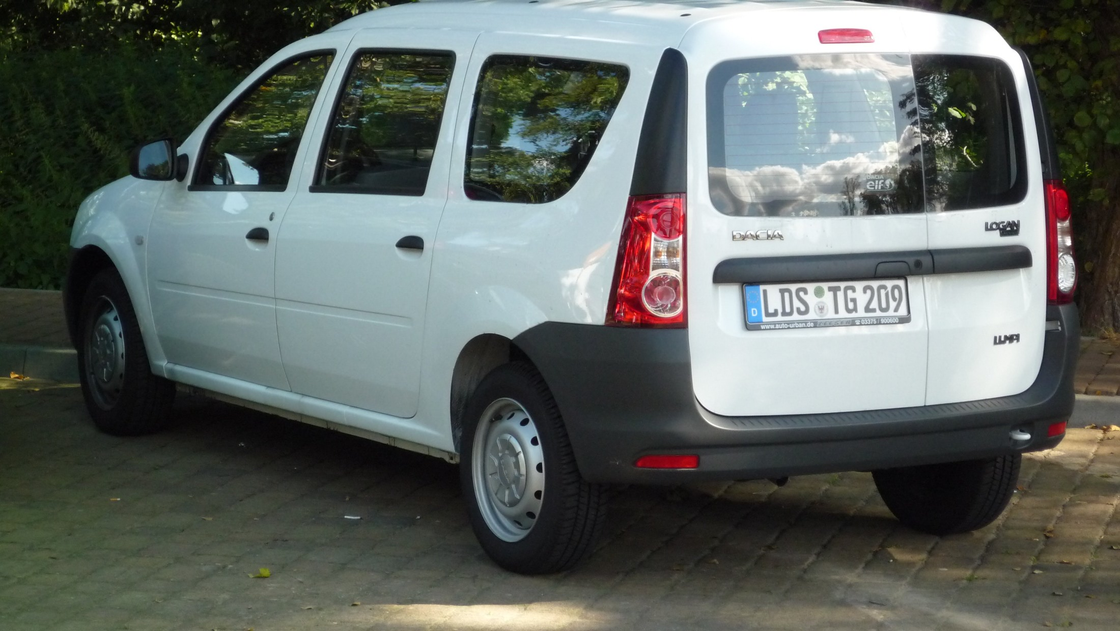 Dacia Logan MCV w Słubicach.